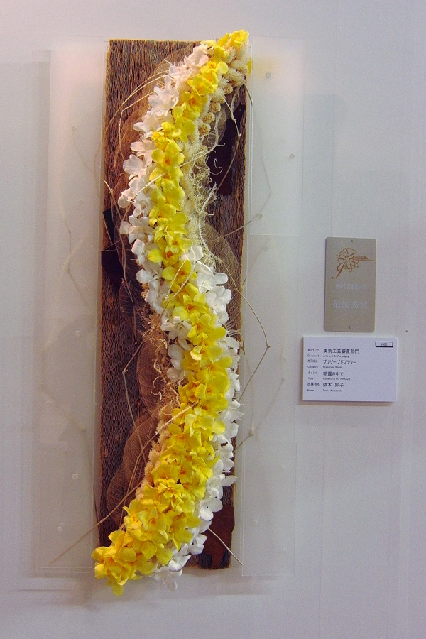 JGP2012【部門5】最優秀賞 「朝靄の中で」 2012/02/26東京ドームにて撮影